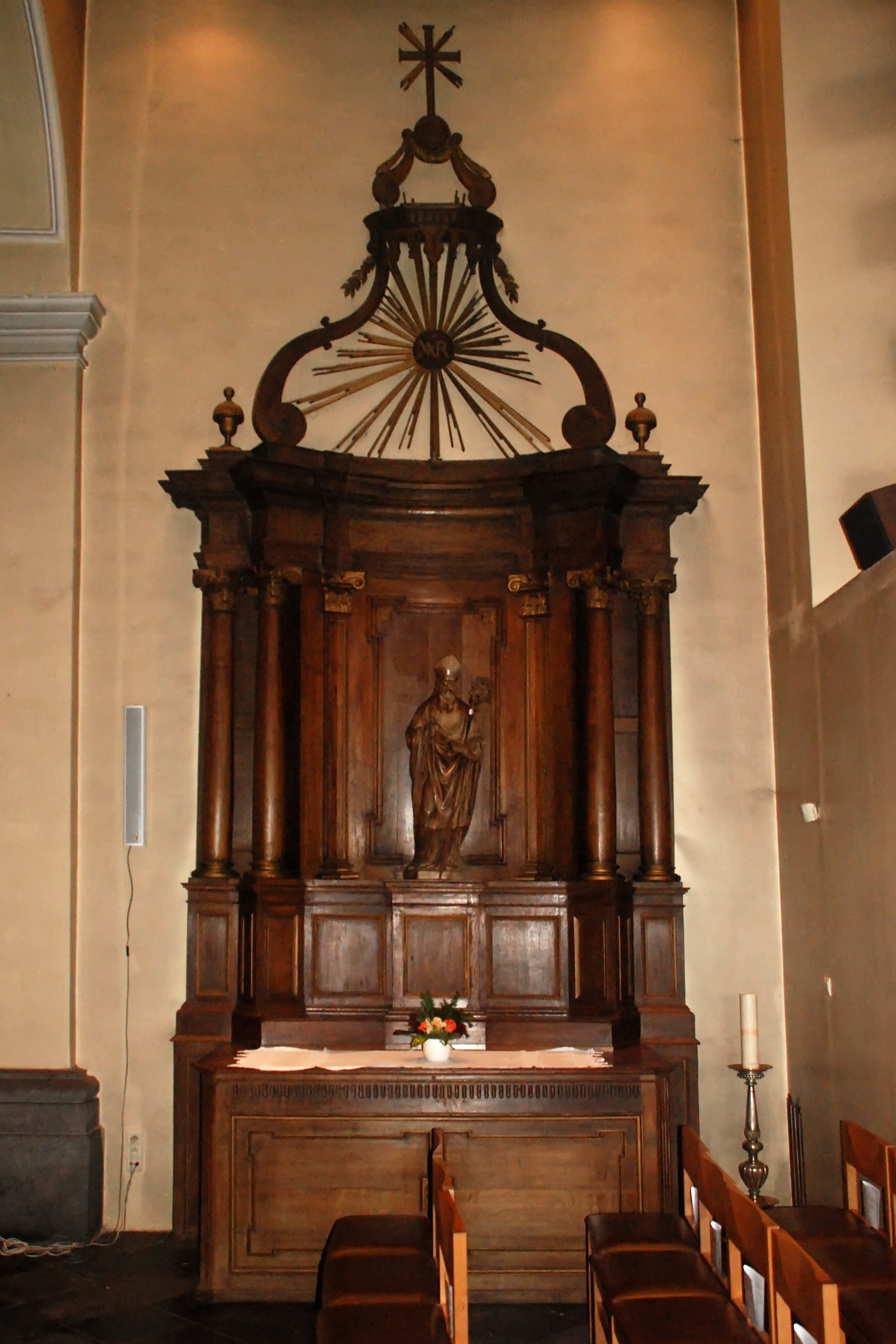 Belgique - Brabant wallon - Ottignies - Église Saint-Rémi